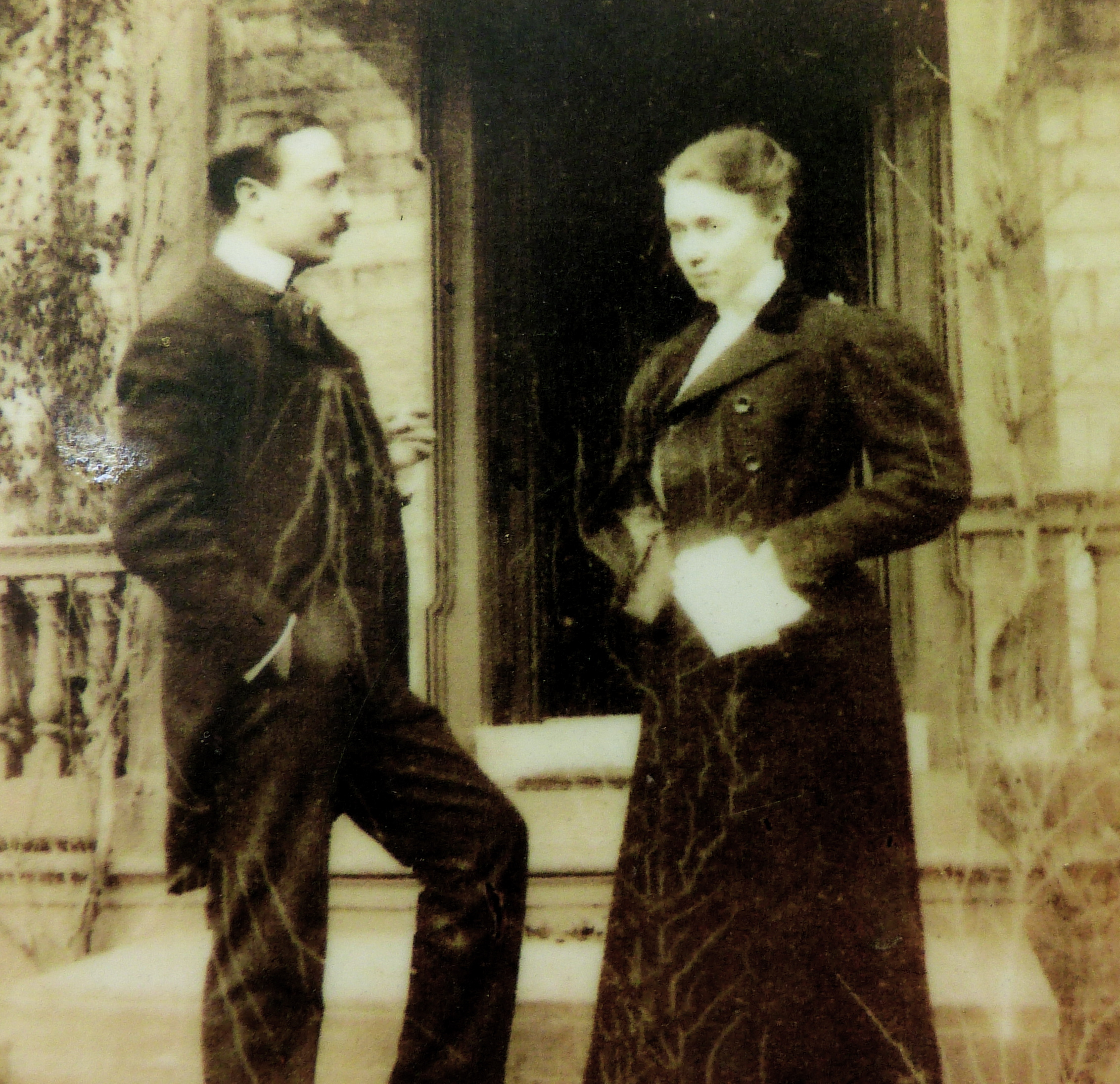 Joachim Carvallo et Ann Coleman, propriétaires du château de Villandry au début du XXe siècle